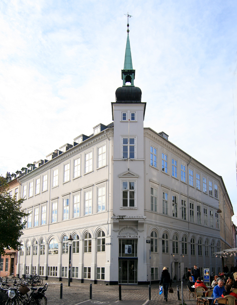 Højbro Plads 4, København. Bygget 1836. Fredet.